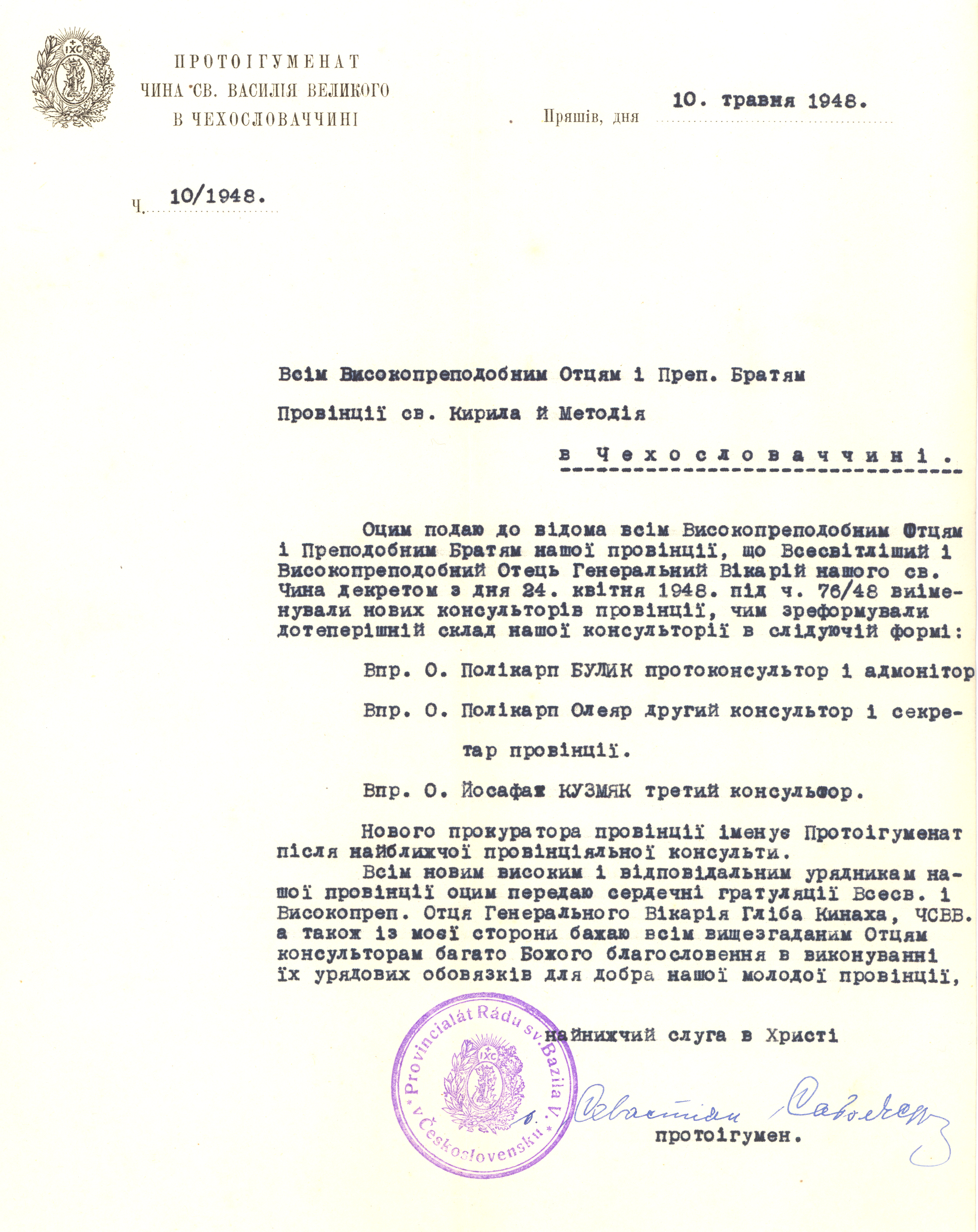 Офіційний лист С. Сабола, ЧСВВ із р. 1948.Document scanned by Jozafát Vladimír Timkovič, OSBM